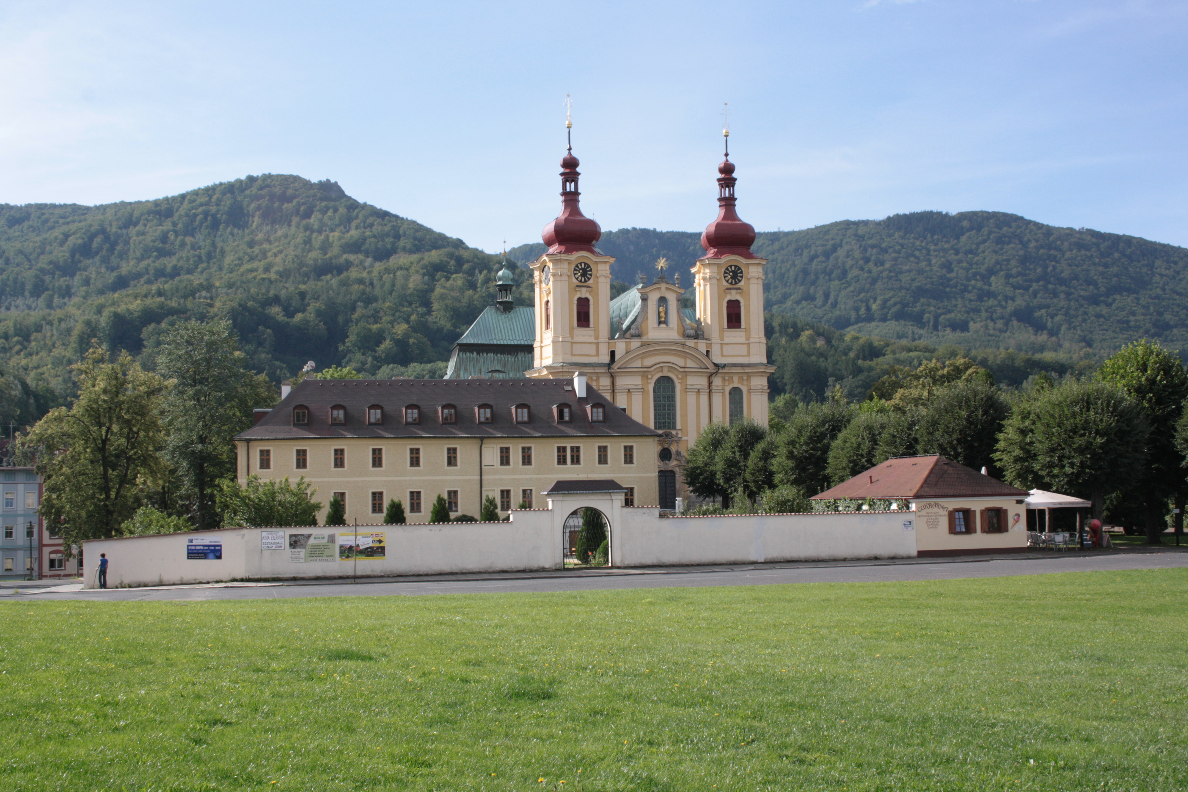 This photograph was taken with a DSLR from WMCZ's Camera grant. Celkový pohled na klášetr s bazlikou v Hejnicích v okrese Liberec.